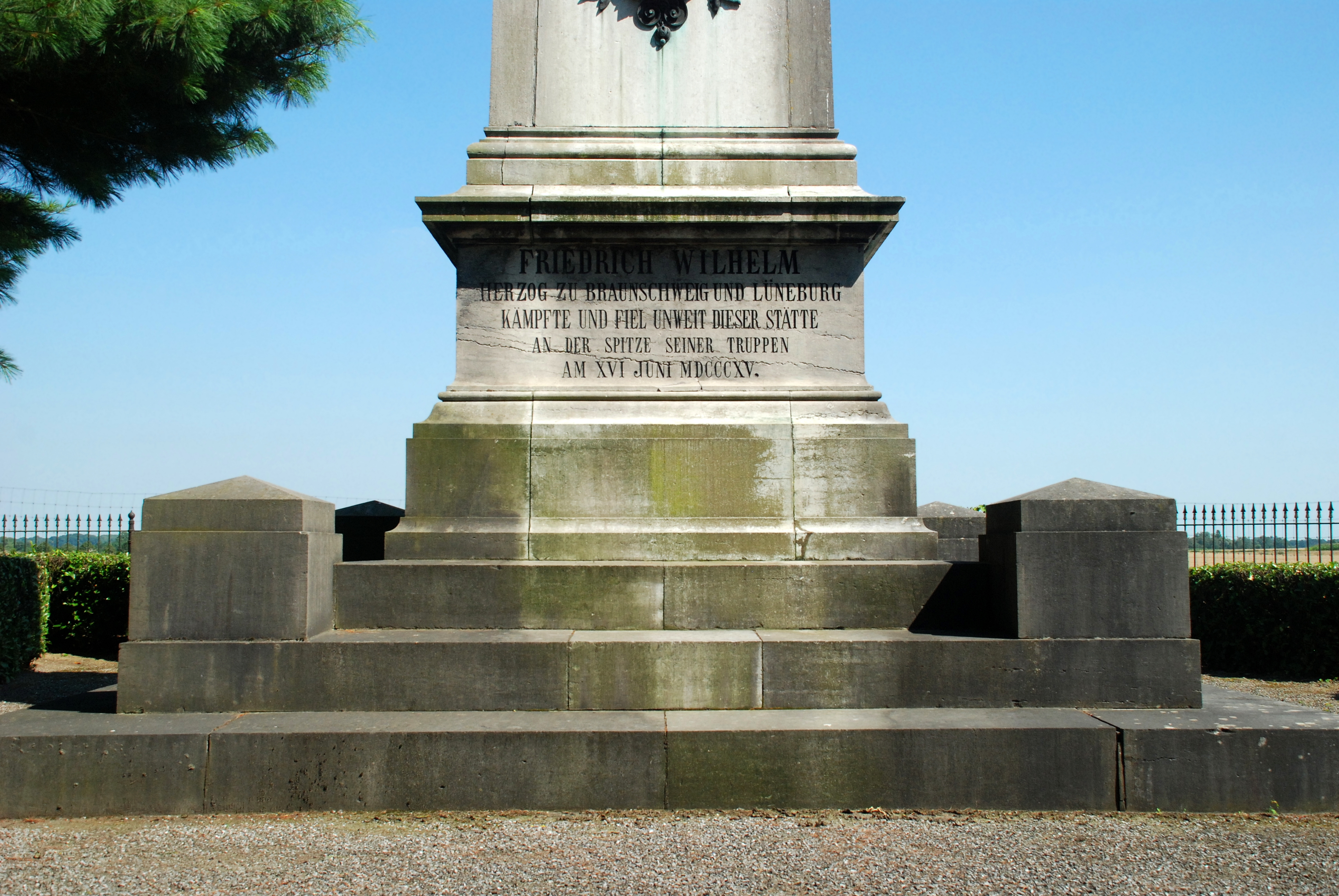 Belgique - Brabant wallon - Genappe - Monument Brunswick